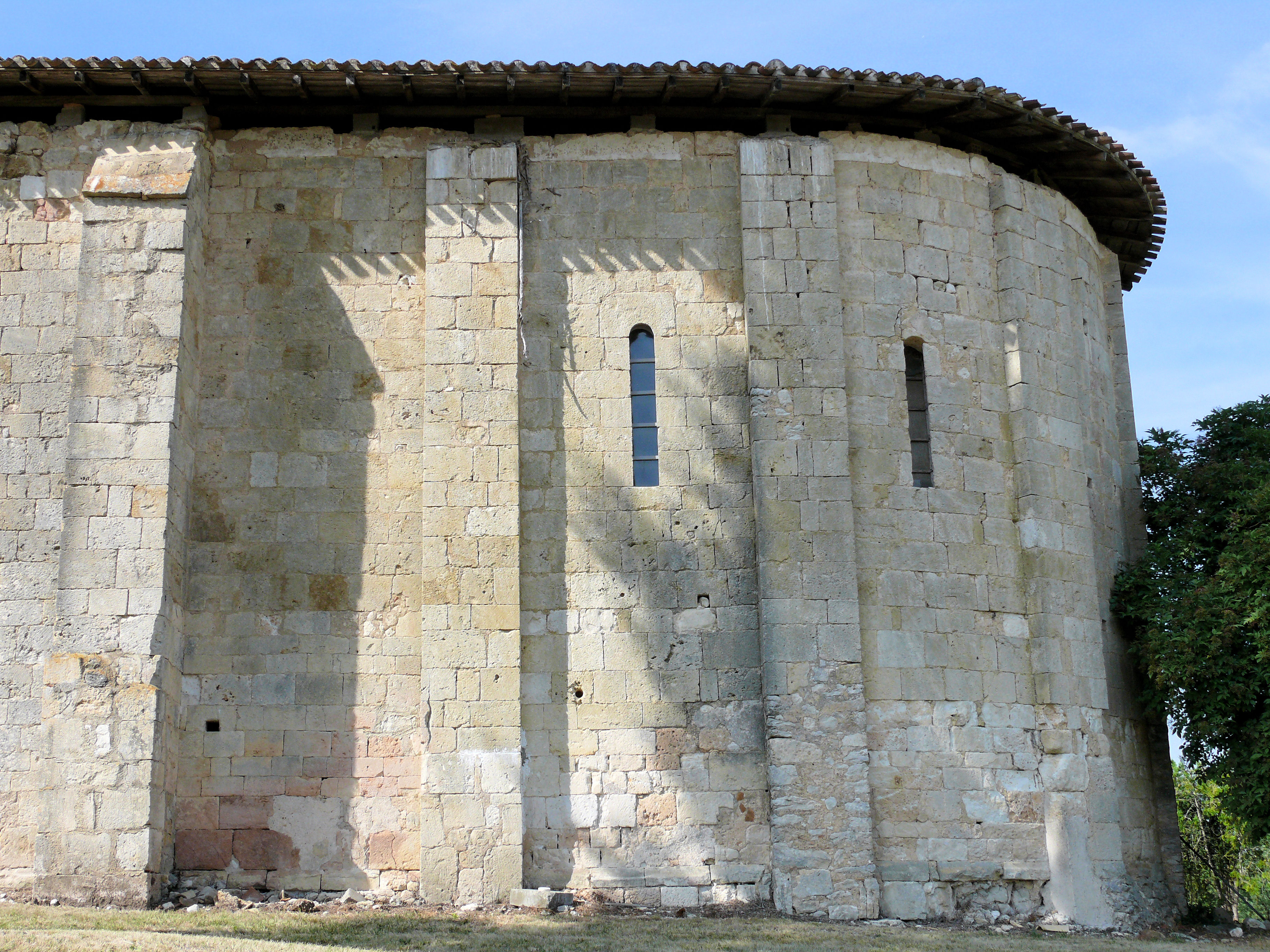 Laussou - Eglise Saint-Pierre - Chevet